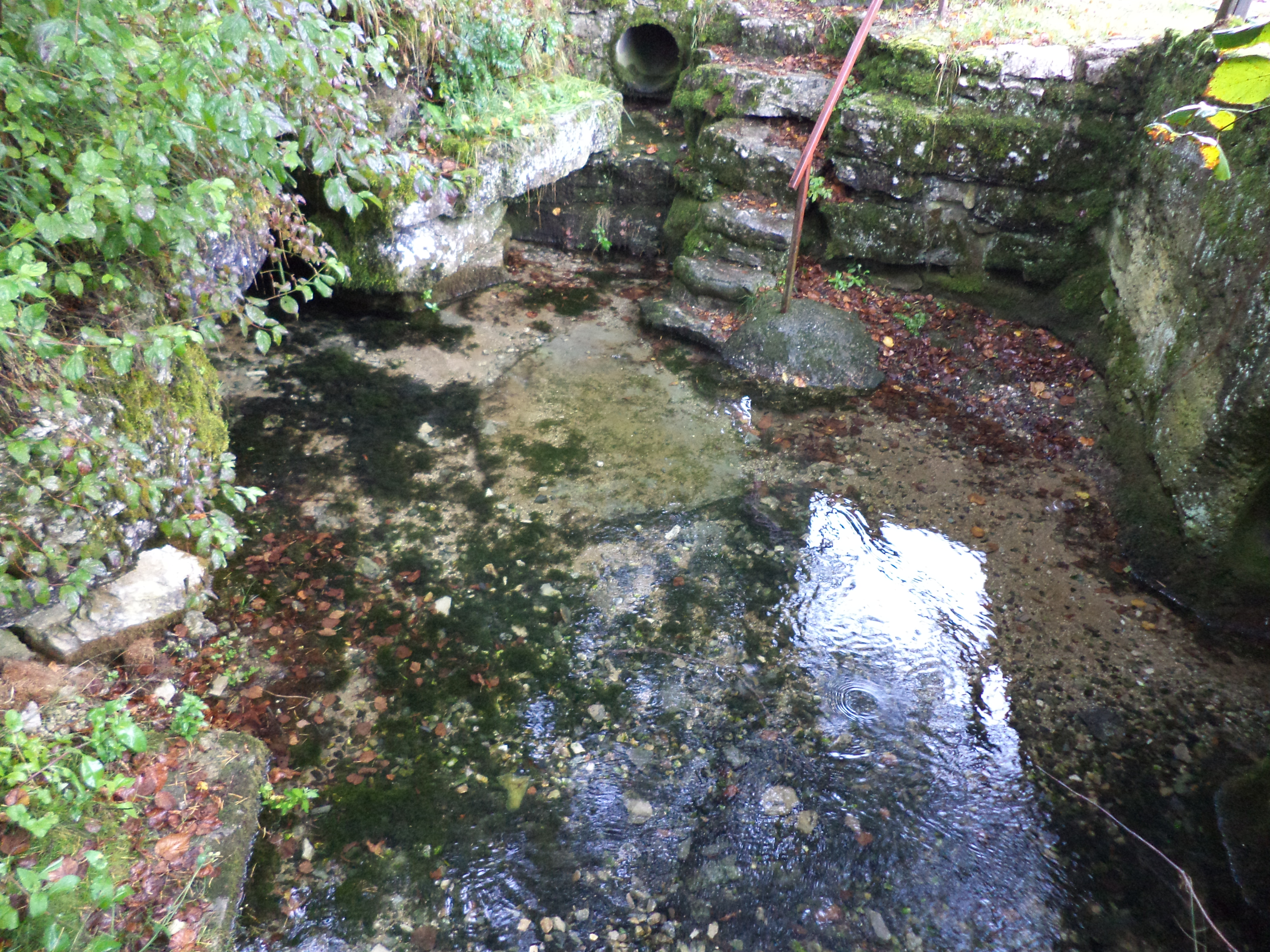 Die Karstquelle Weihersbrunnen bei Alladorf